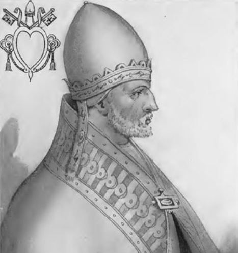 Buste du pape Lucius III.